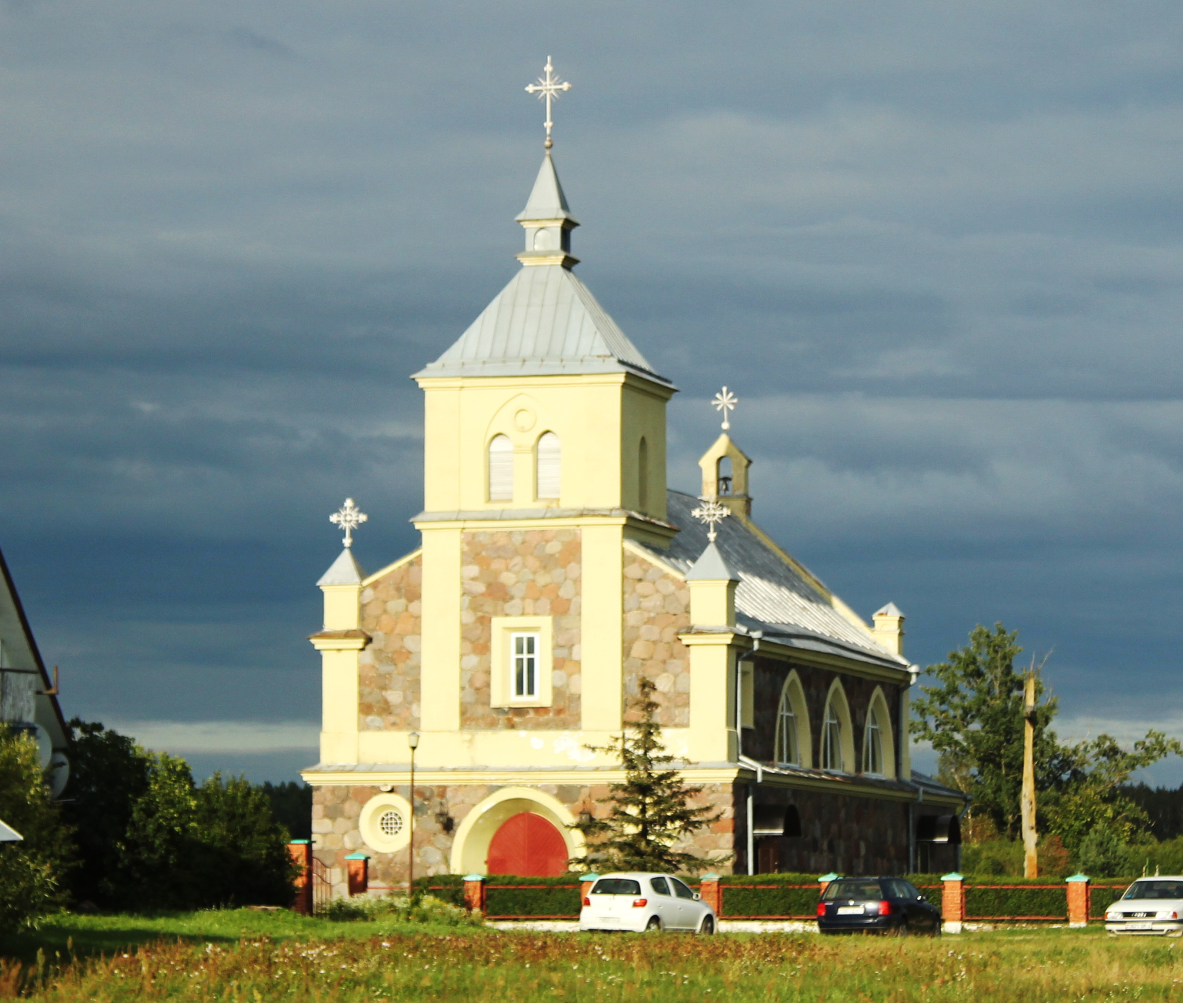 Kościół św. Linusa w Pielasie, rejon werenowski, Białoruś